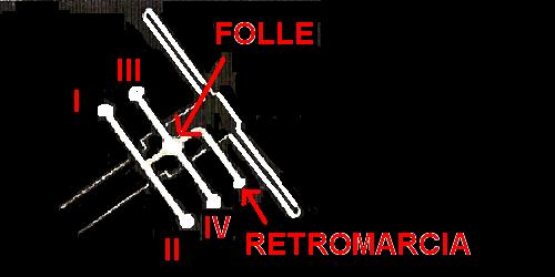 Disegno creata autonomamente dal sottoscritto Giomayo utilizzando il programma Paint di Windows